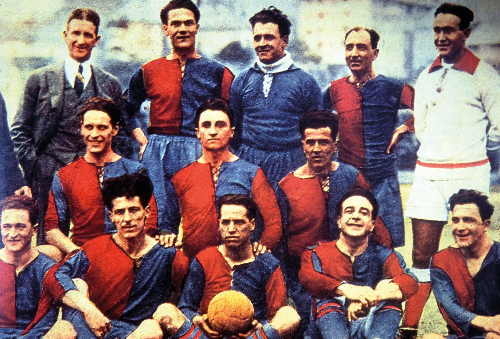 Genova, Campo di Via del Piano, 2 marzo 1924. La formazione del Genoa CFC scesa in campo nella sconfitta interna contro l'AC Padova (1-2) valevole per la 18ª giornata del campionato italiano di Prima Divisione 1923-24, Lega Nord, girone A. Da sinistra, in alto: W. Garbutt (allenatore), D. Bellini, G. De Prà, R. De Vecchi, Alfieri (arbitro); al centro: O. Barbieri, L. Burlando, E. Leale; in basso: E. Neri, E. Sardi (II), E. Catto (I), A. Santamaria (I), A. Bergamino (I).